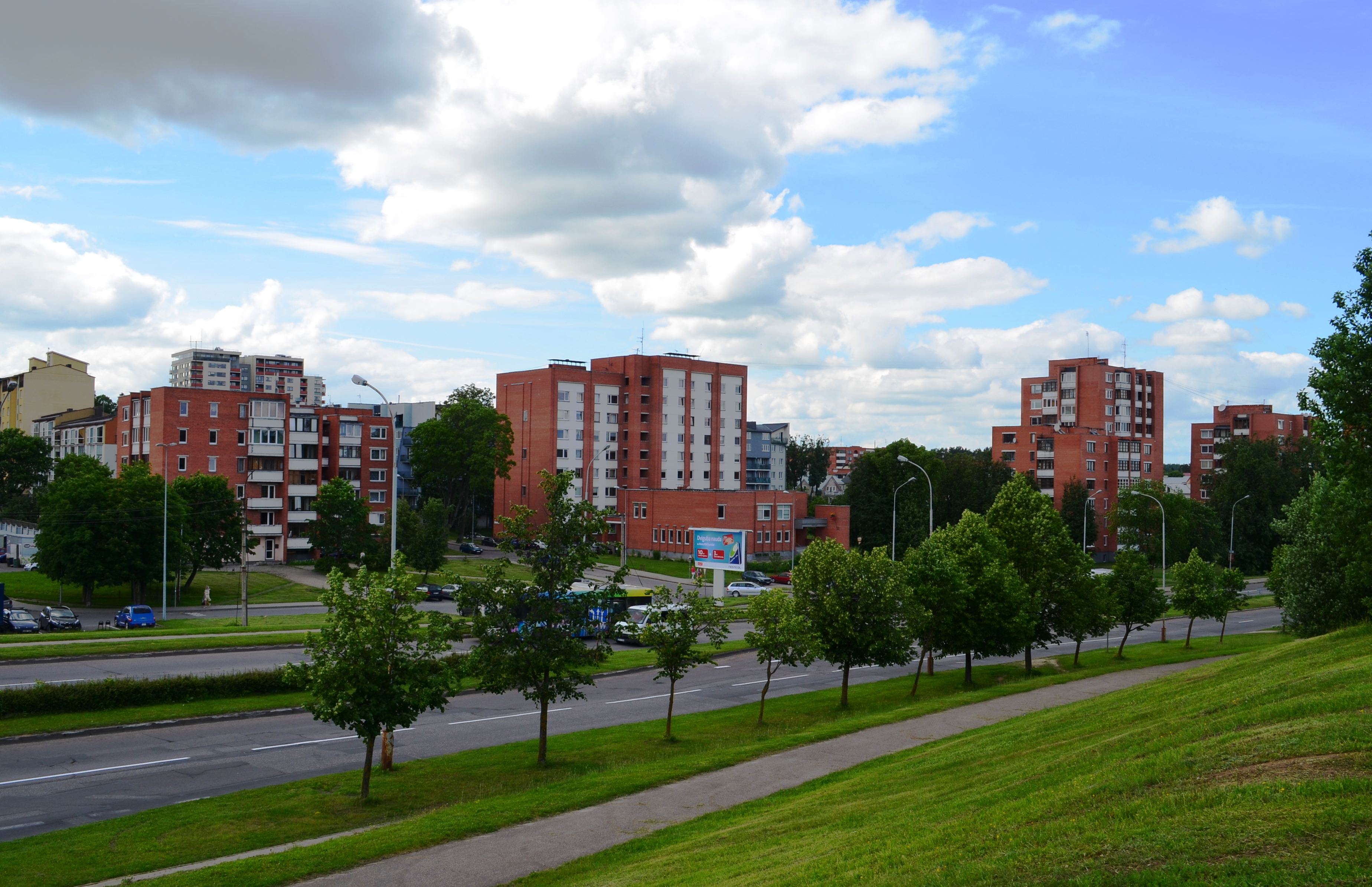 Jeruzalės g., Jeruzalė, Vilnius